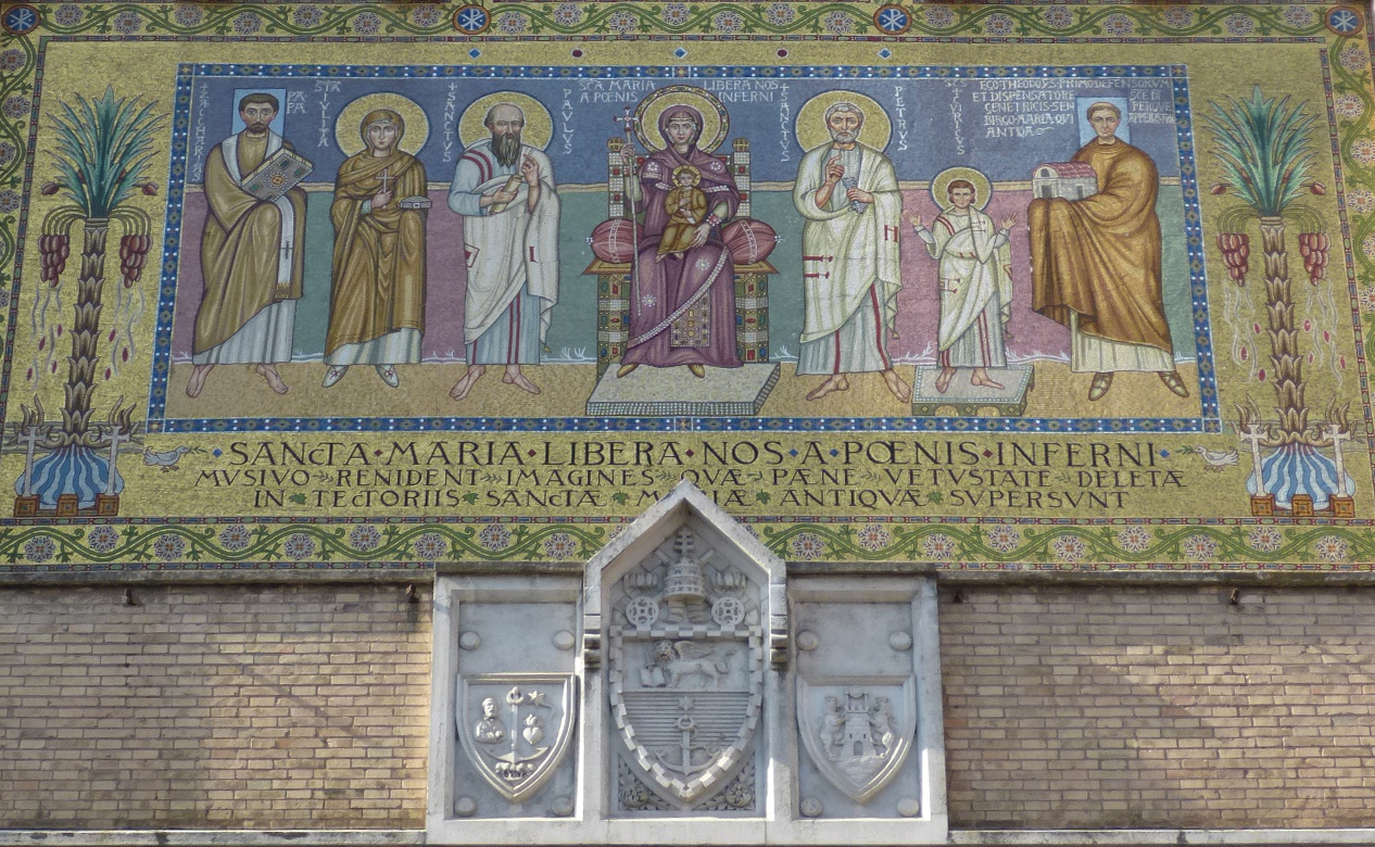 Roma, S. Maria Liberatrice a Testaccio. Particolare del mosaico e stemmi dei fondatori. Da sinistra: stemma dei Salesiani, di Pio X, delle Oblate di Tor de'Specchi.